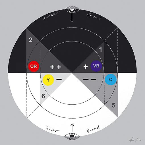 Schema zur Helligkeits- und Farbdifferenzierung im Analogiemodell (AMC). Bendin 1991